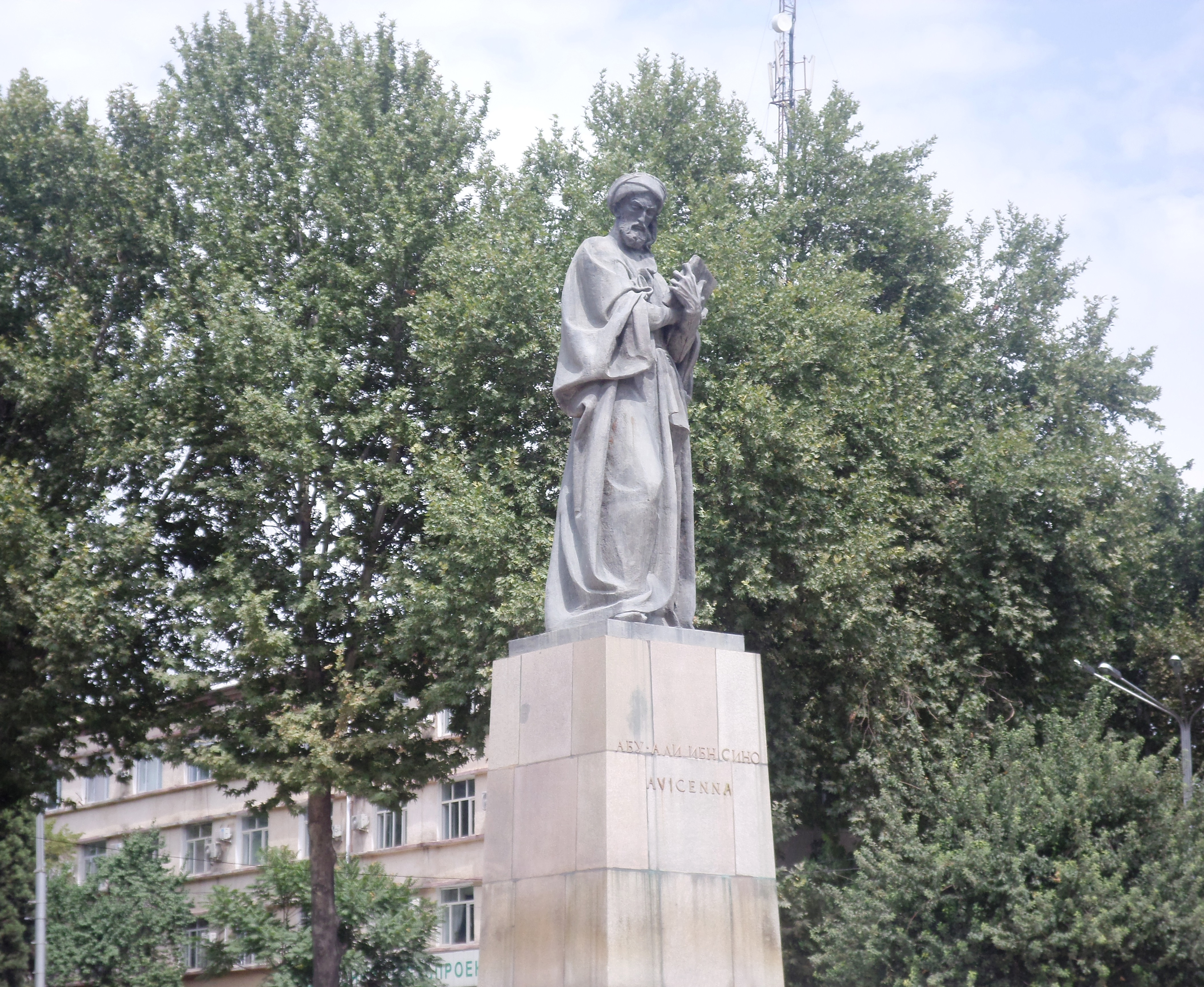 Монумент Авицене (Абуали ибн Сино) в г. Душанбе Тоҷикӣ: Муҷассамаи А. Сино дар ш. Душанбе